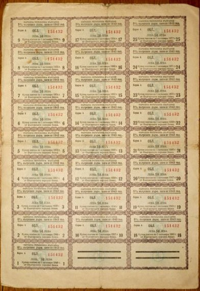 Купони от българска облигация, 1943 година